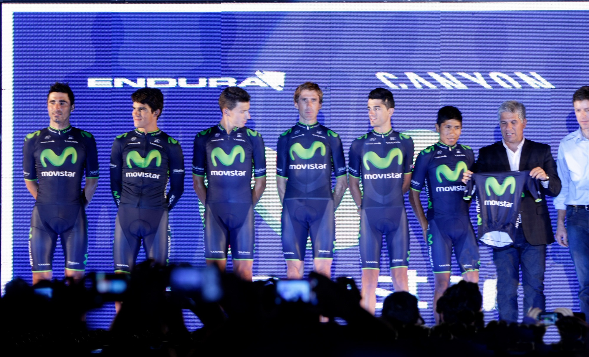 El Movistar Team en la Presentación del Tour de San Luis 2014.